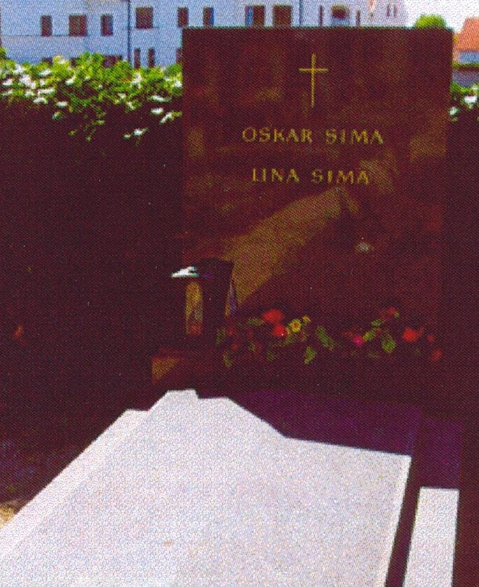 Friedhof Langenzersdorf-Lina Woiwode